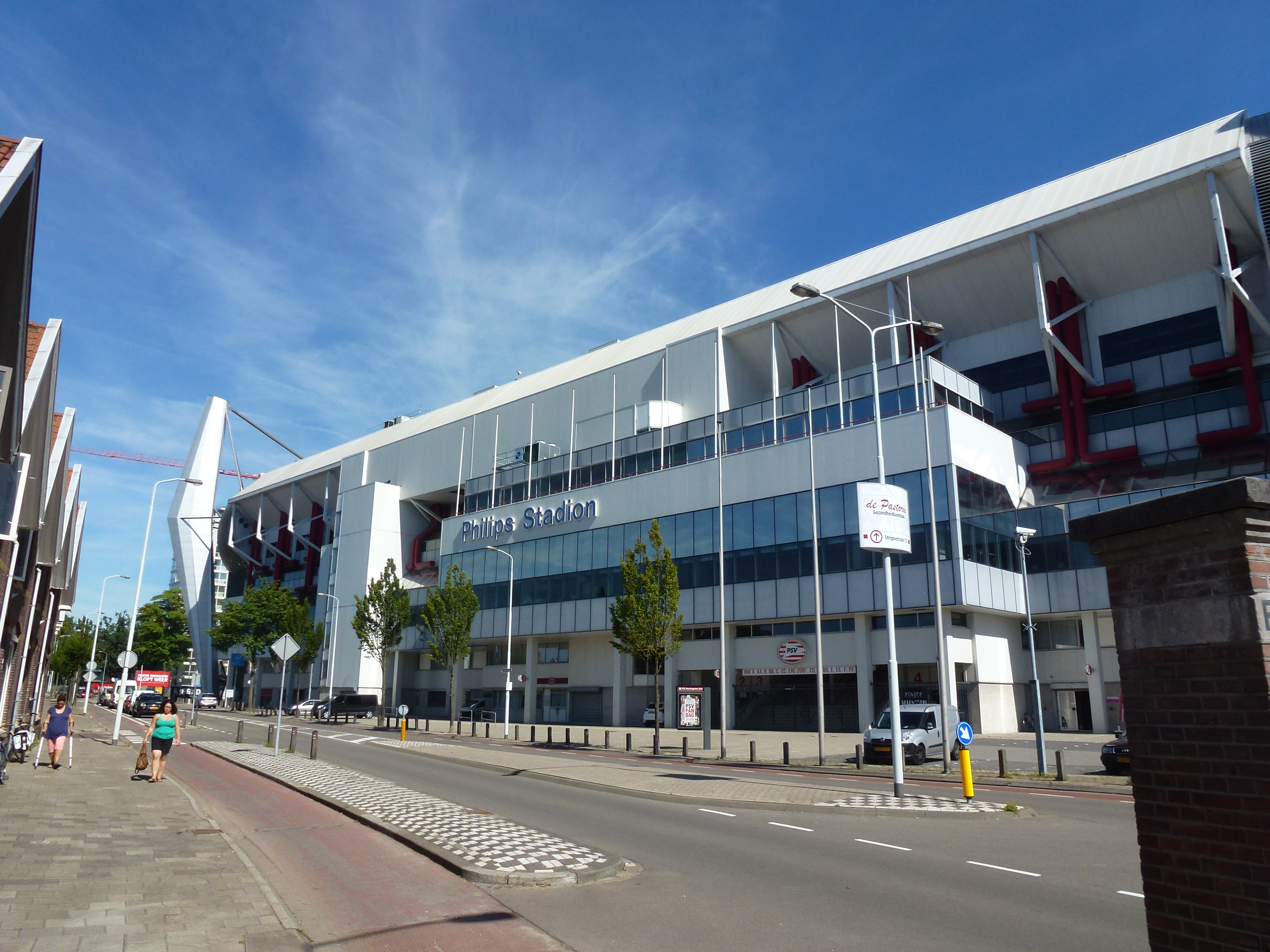 PSV Stadion Eindhoven